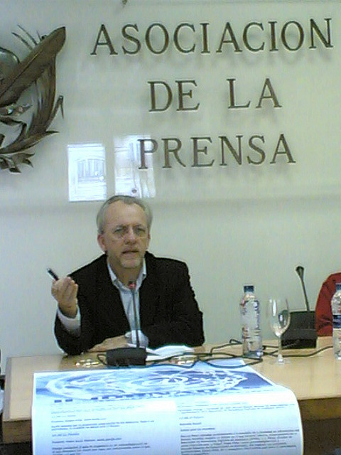 Manuel Pezzi en la Asociación de la Prensa de Granada